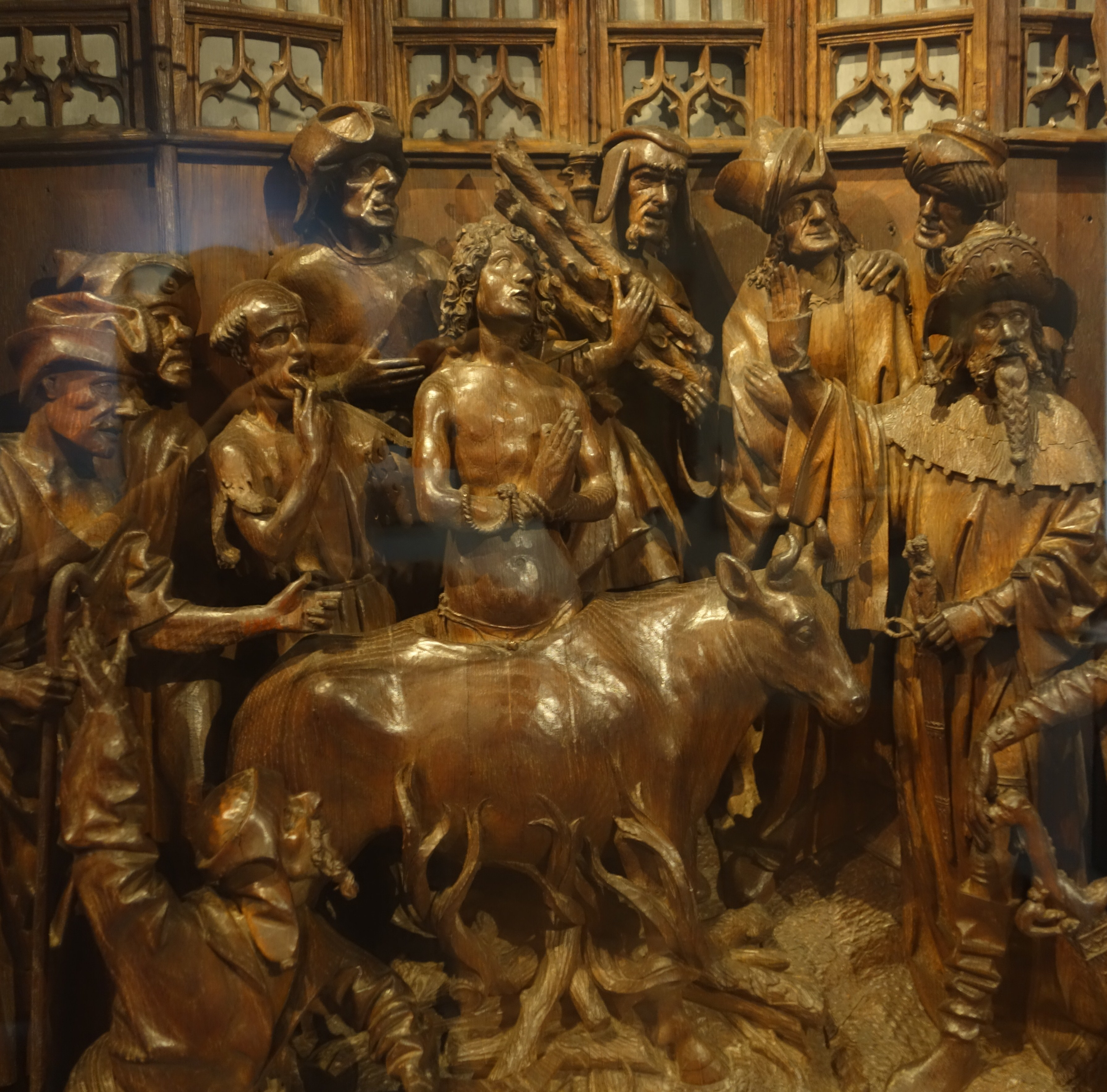 Sint-Jorisretabel (1493). Detail uit het vijfde tafereel (v.r.n.l.) van het martelaarschap van Sint-Joris. De heilige wordt gedompeld in een stiervormige ketel gevuld met kokend lood. Rechts van hem staat keizer Diocletianus, met gevlochten baard.